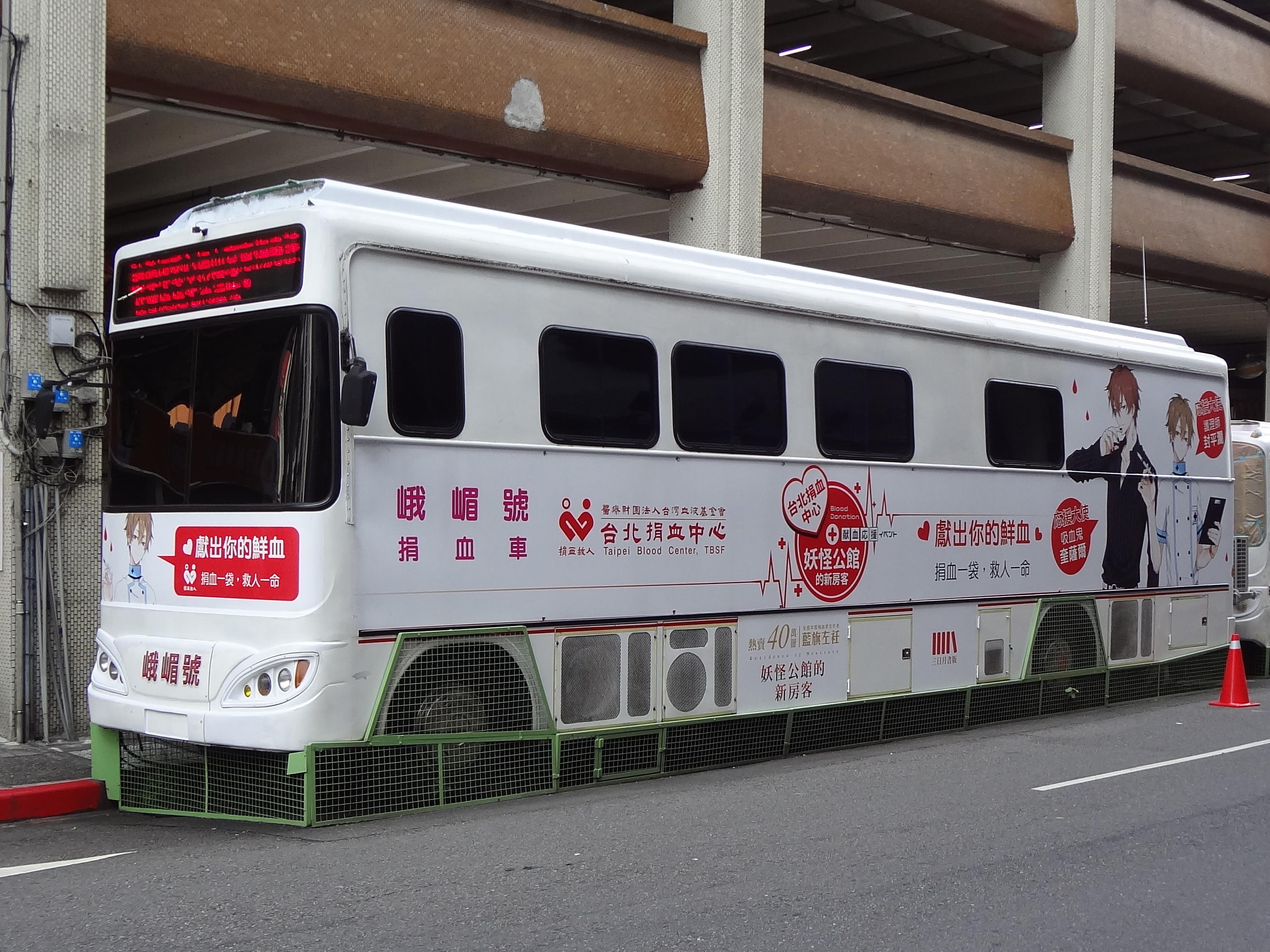 半固定停放臺北市萬華區峨眉立體停車場南側的臺灣血液基金會峨嵋號捐血車，左側車身彩繪三日月書版提供的藍旗左衽輕小說《妖怪公館的新房客》捐血宣導廣告。